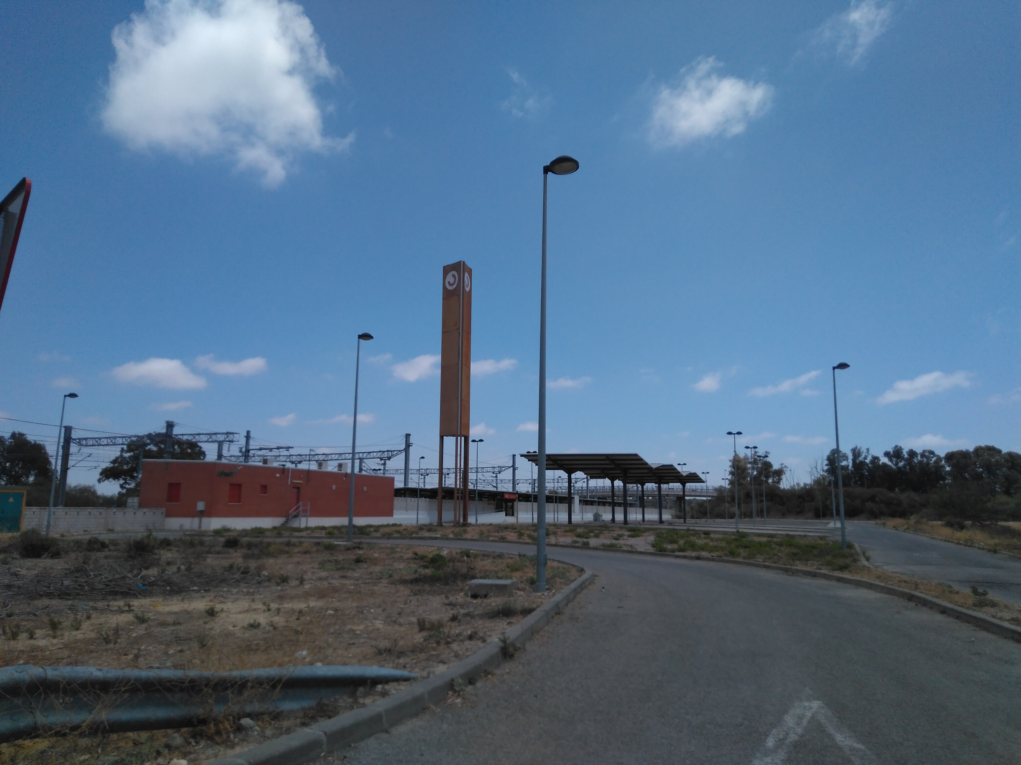 Estación de ferrocarril Las Aletas (Cercanías Cádiz, España)